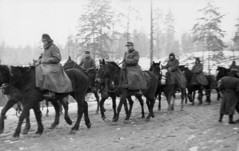 Scherl: Auf einer Verbindungsstraße zwischen Ilmensee und Finnischem Meerbusen Im Zuge der Frontverkürzung gehen Einheiten in planmäßiger Ordnung in die ihnen neu zugewiesenen Stellungen. Achtung! PK-Aufnahme Kriegsberichter Reimers 28.2.44 [Herausgabedatum] Zentralbild: II. Weltkrieg 1939-45 An der Front in der Sowjetunion. Ende Februar 1944. Bei der sowjetischen Offensive zur Befreiung des Leningrader Gebietes Januar-März 1944 räumen die deutschen Truppen das ganze Gebiet zwischen Ilmensee und Finnischem Meerbusen bis zum Peipus-See.